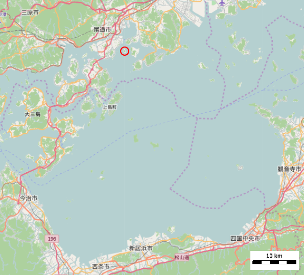 広島県尾道市の加島周辺 This map may be incomplete, and may contain errors. Don't rely solely on it for navigation.